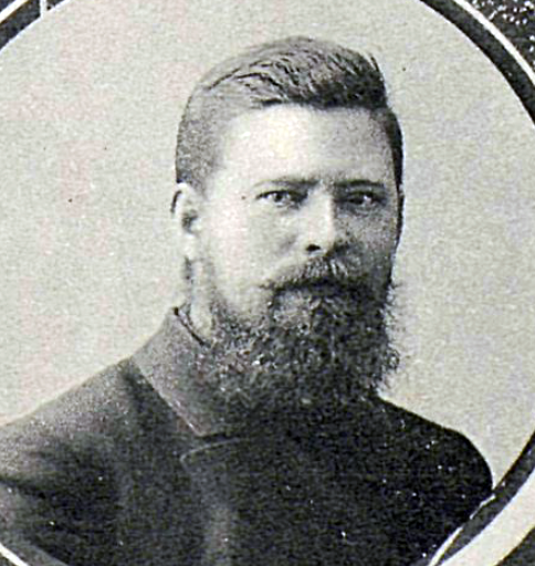 Иван Николаевич Попов (Попов 4-й; 1878, Вологодская губерния — после 1912) — крестьянин, депутат III Государственной думы от Вологодской губернии (1907—1912).